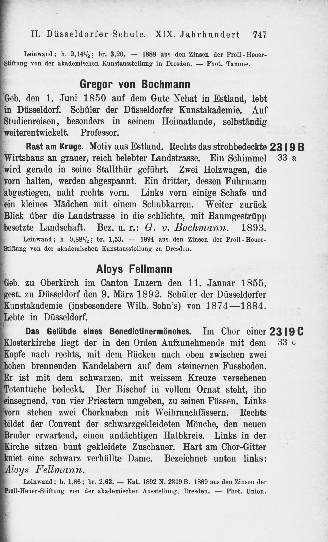 Katalog der Königlichen Gemäldegalerie zu Dresden. Herausgegeben von der Generaldirektion der Königlichen Sammlungen für Kunst und Wissenschaft. Druck von Wilhelm Hoffmann Kunstanstalt auf Aktien, Dresden. Seite 747